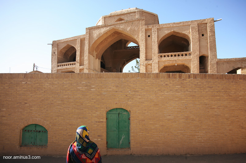 مسجد خسرو شهر اردستان- عکس از امیررضا توسلی